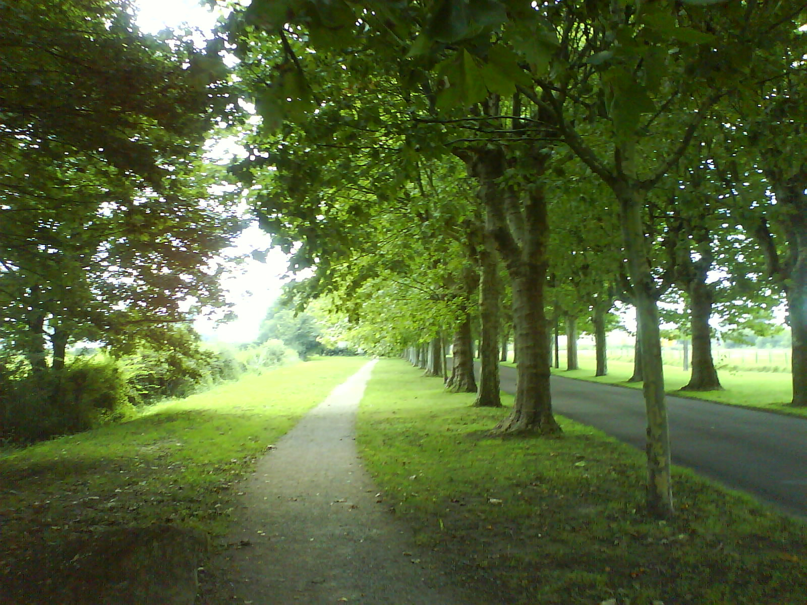 Allée des platanes